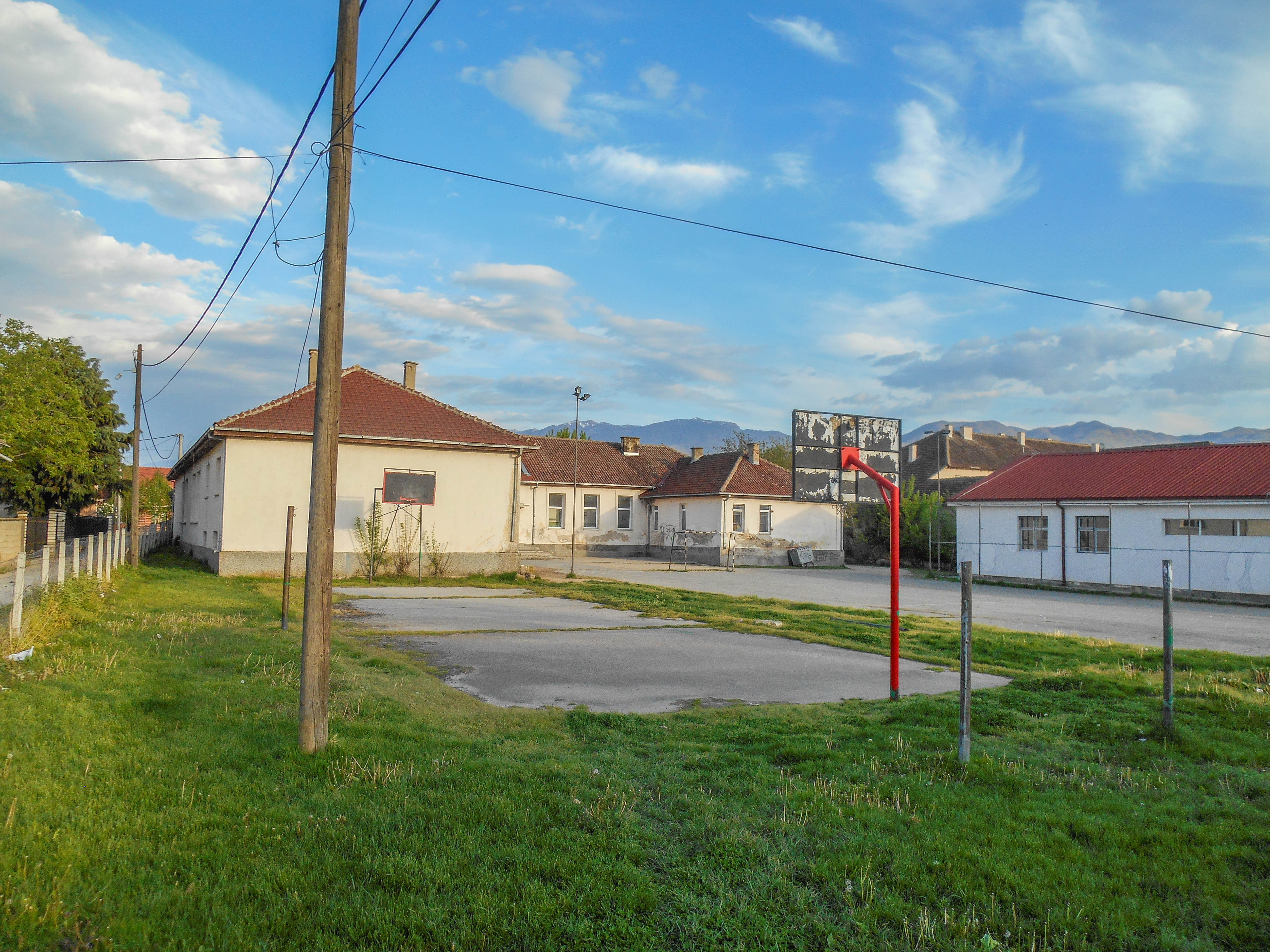 Основно училиште „Св. Кирил и Методиј“ - Турново